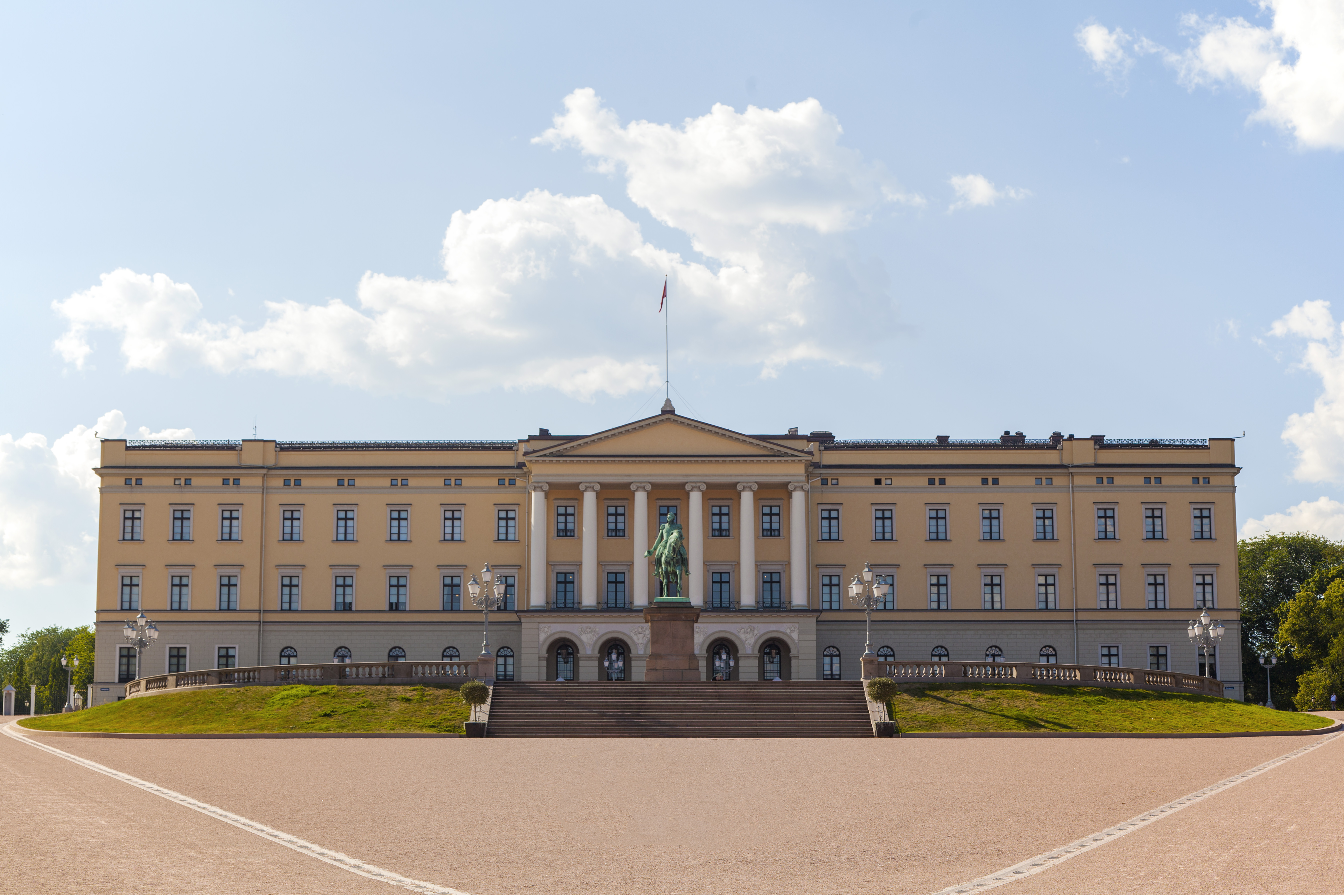 Slottet i Oslo.